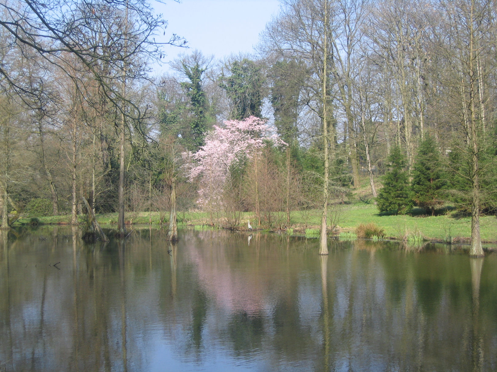 Sumpfzypressen-Teich im Rombergpark Dortmund, Frühlingsimpression mit Fischreiher